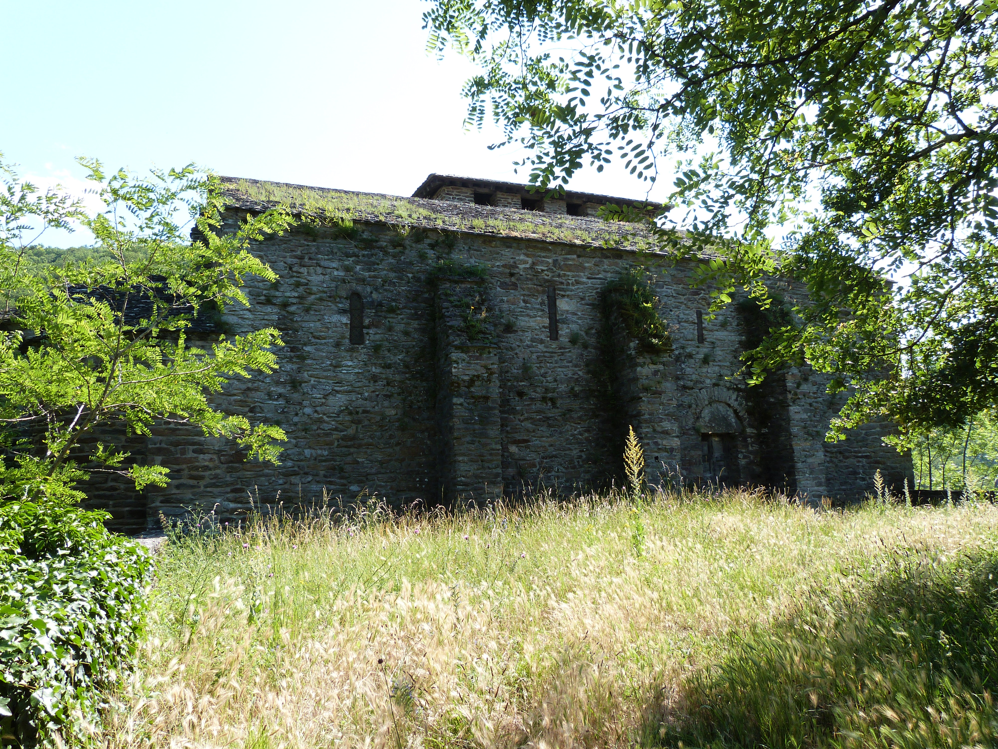 Église Notre-Dame-de-Lasplanques de Tanus, (Classé, 1913) L'ensemble de l'édifice est construit en moellons de gneiss. .